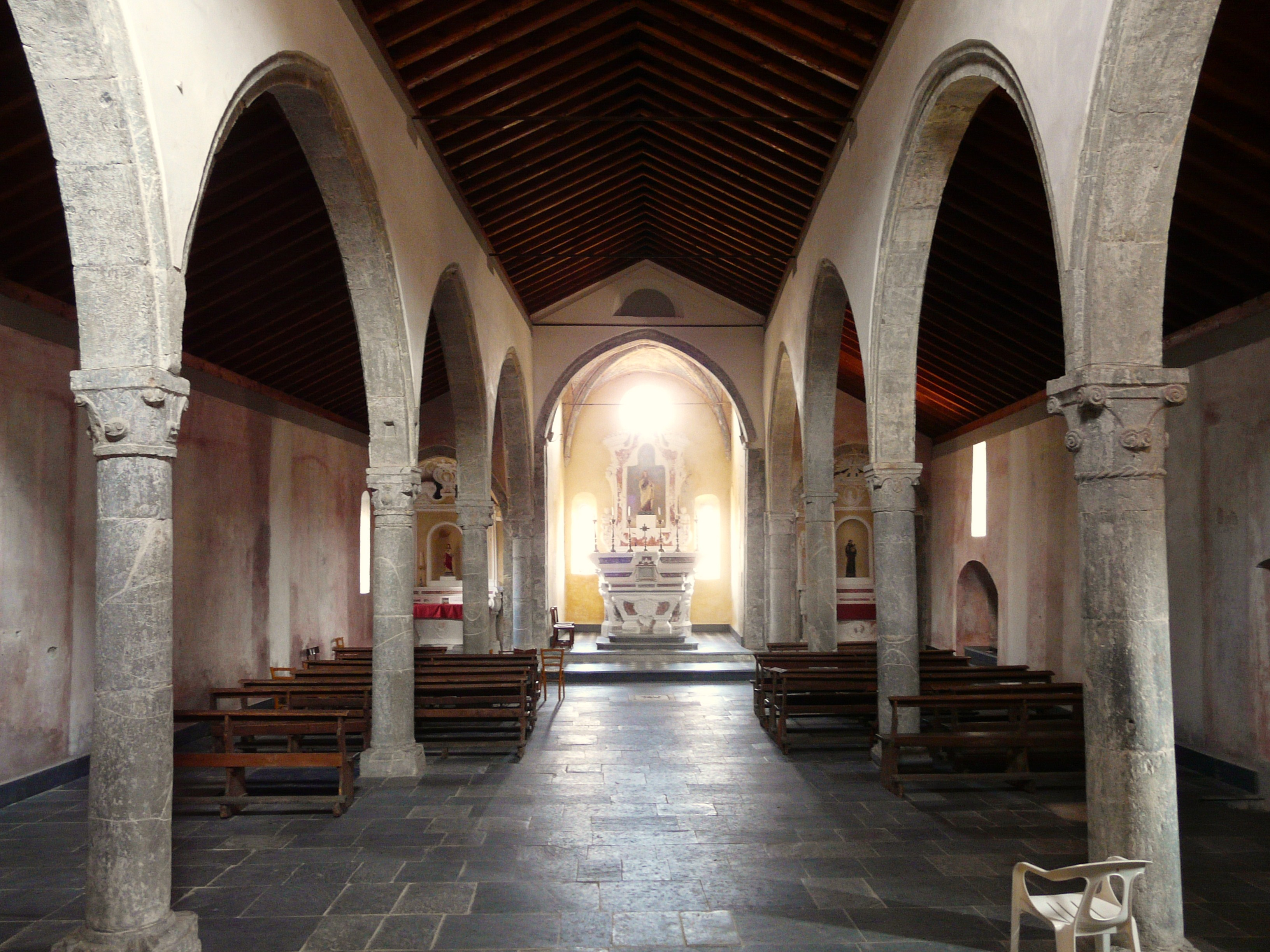 Chiesa della Maddalena, Lucinasco, Liguria, Italia